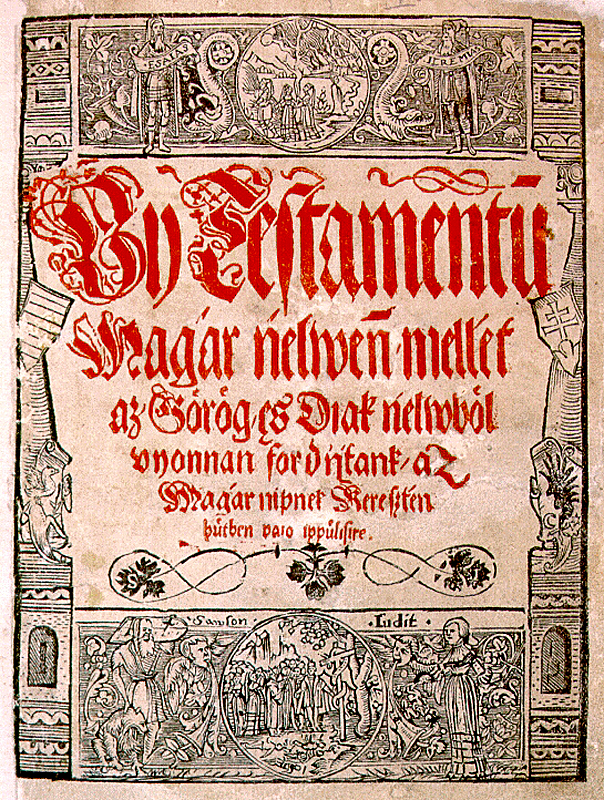 La titolpaĝo de la Nova Testamento (hungare (Új Testamentum), tradukita al hungara lingvo de János Sylvester.